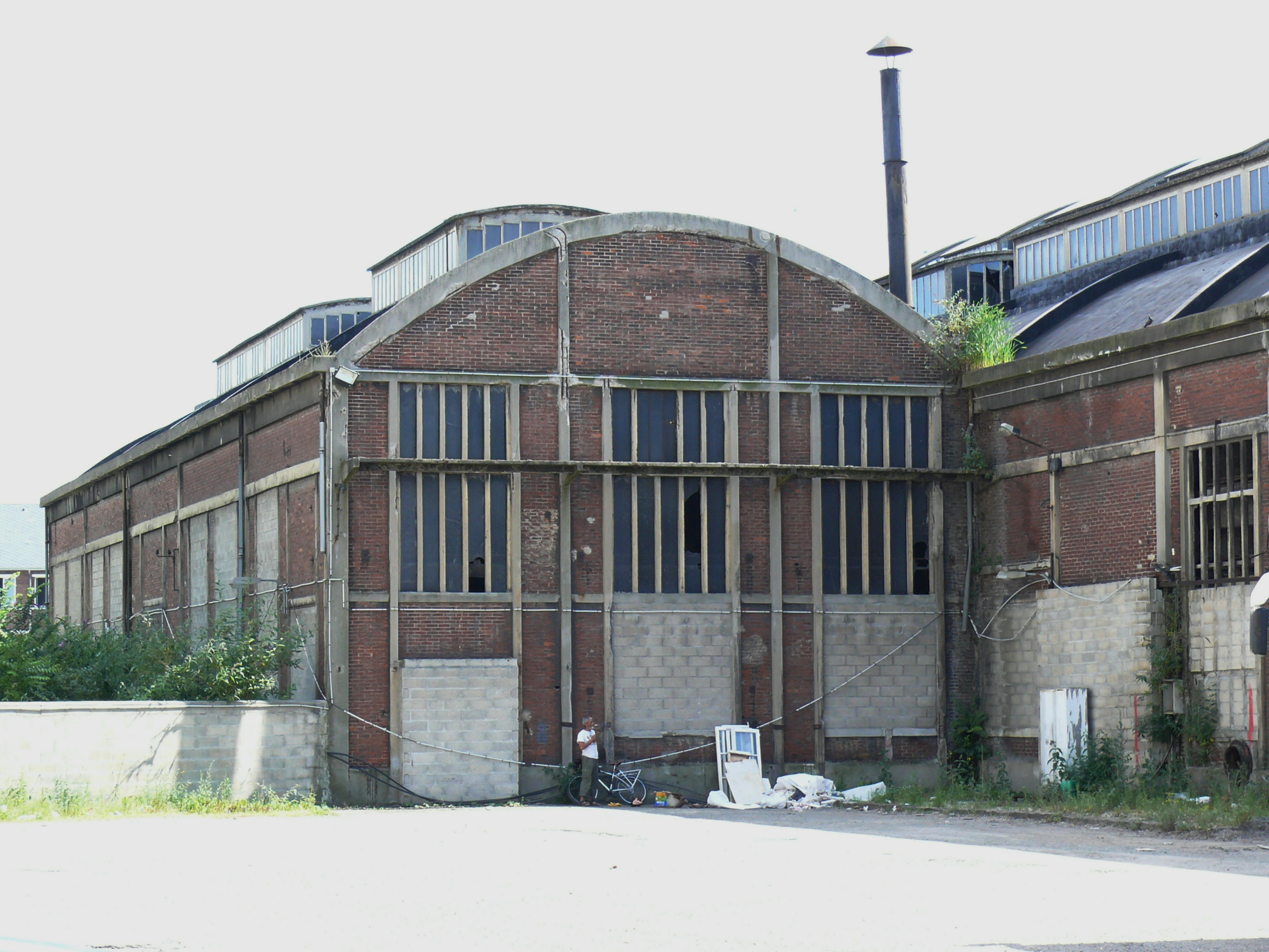 L'un des deux halls sauvegardés du Dépôt de La Plaine